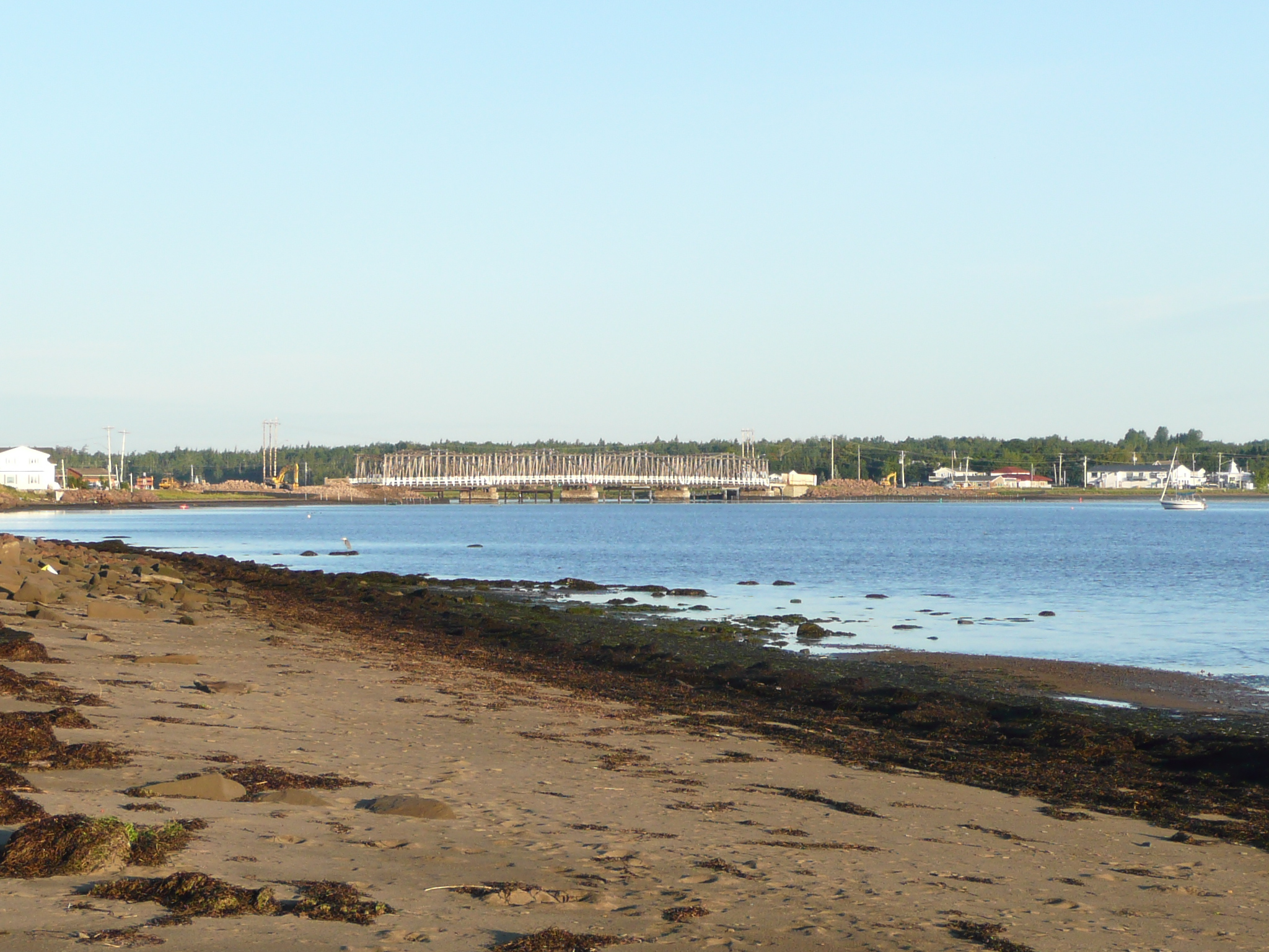 le pont de la rivière cocagne qui relie cocagne nord a cocagne sud avant sa démolition.